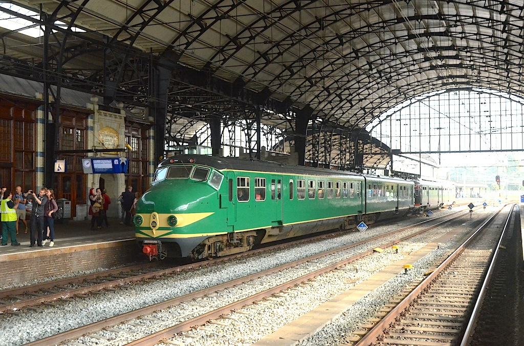 Treinstellen NS 386 + 273 ('Hondekop en Muizeneus') in het Station Haarlem. Foto: Erik Swierstra.